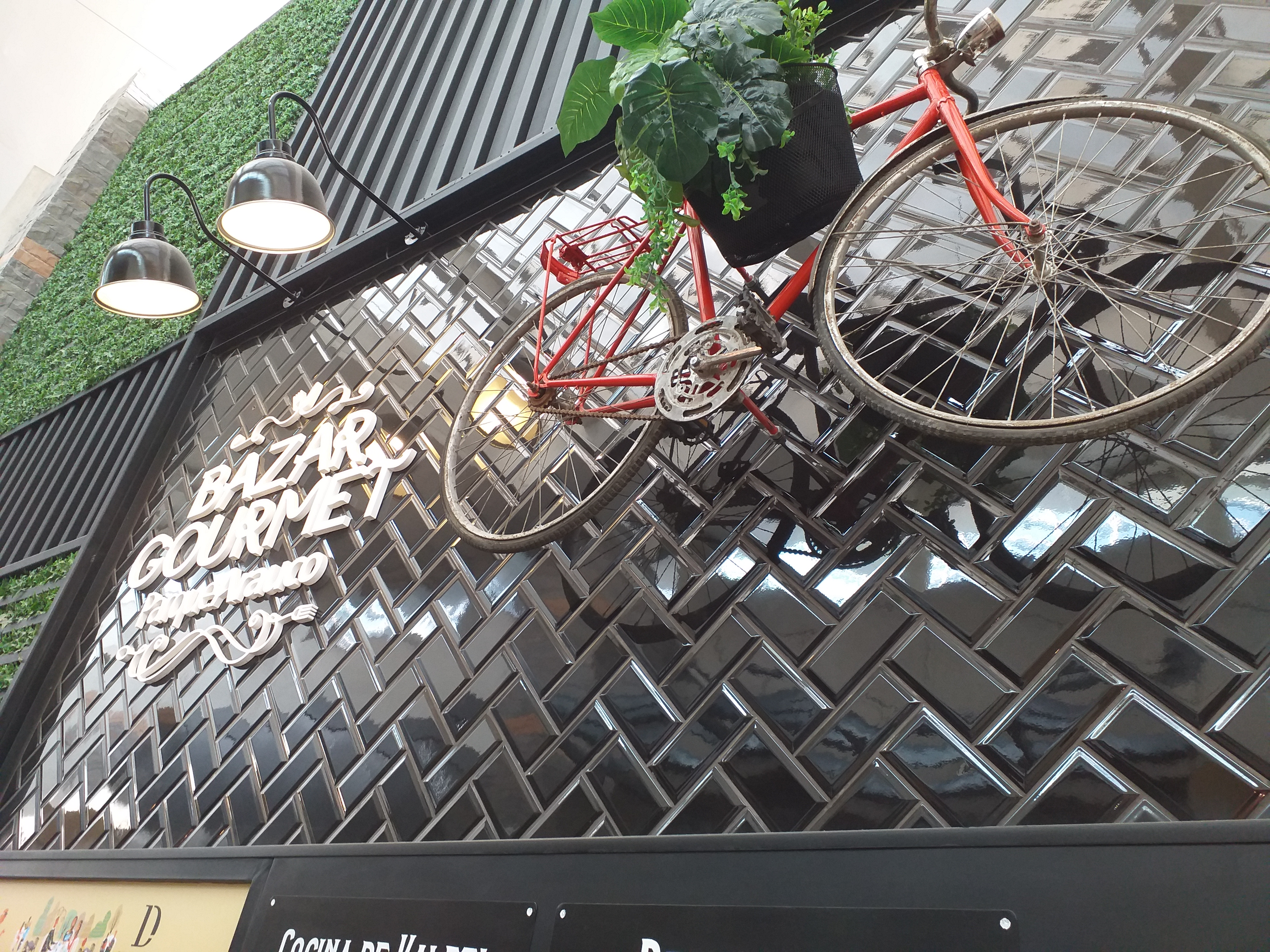 Bazar Gourmet